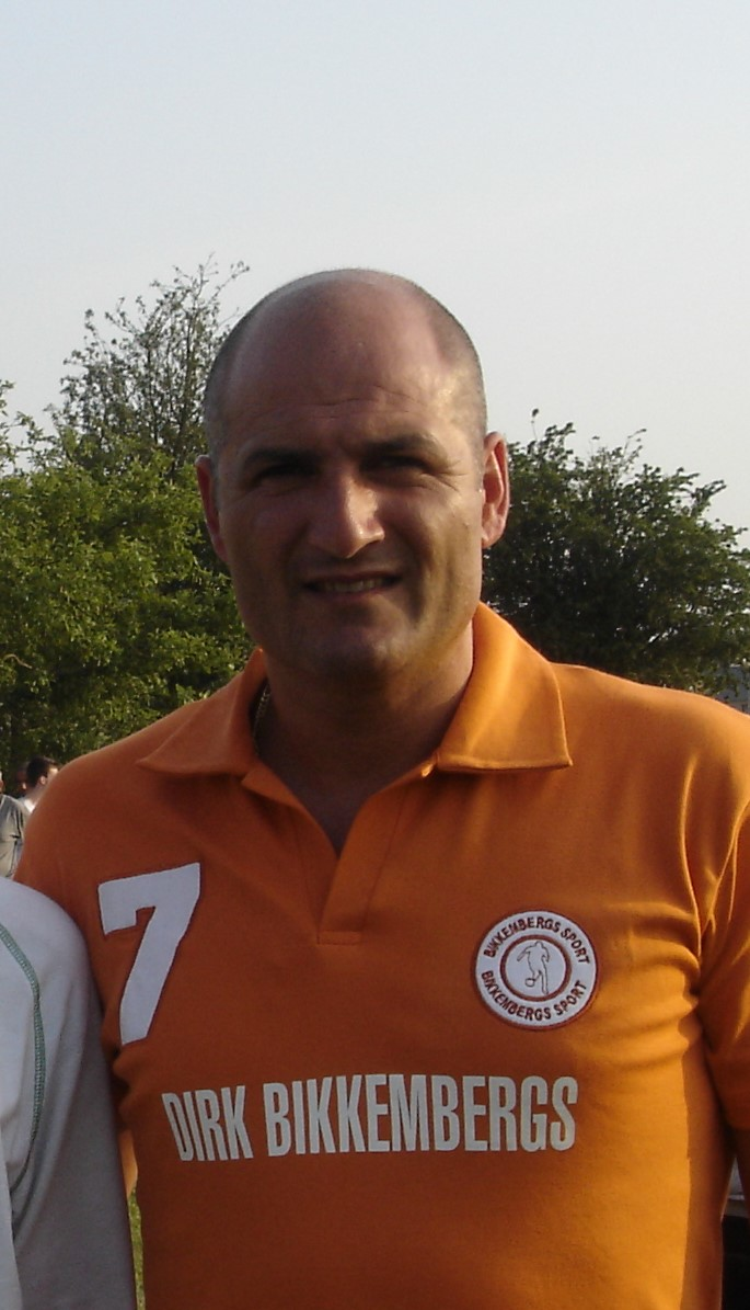 Dante Brogno - Sporting Charleroi